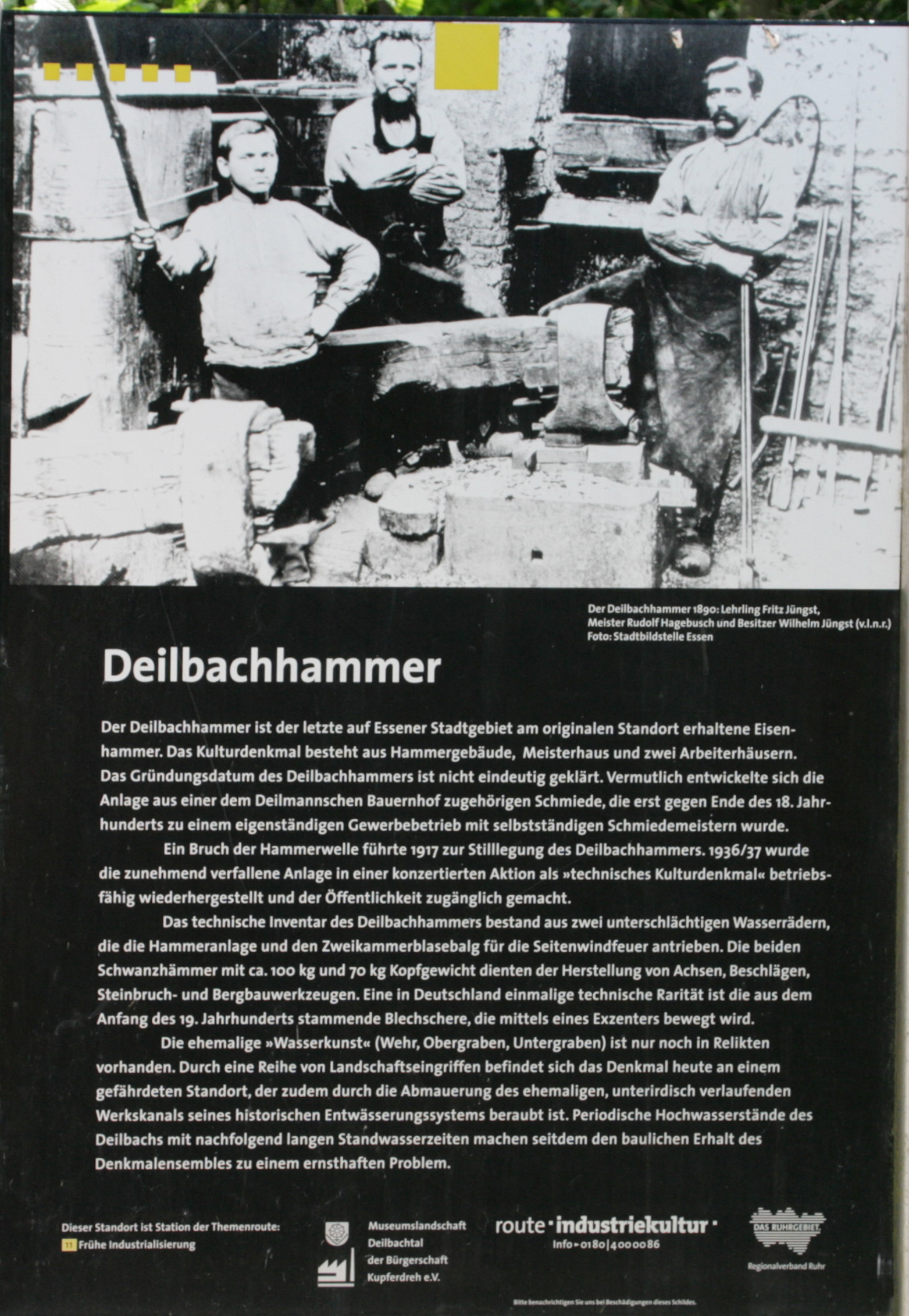 Deilbachhammer, Eisenhammerweg in Essen-Kupferdreh